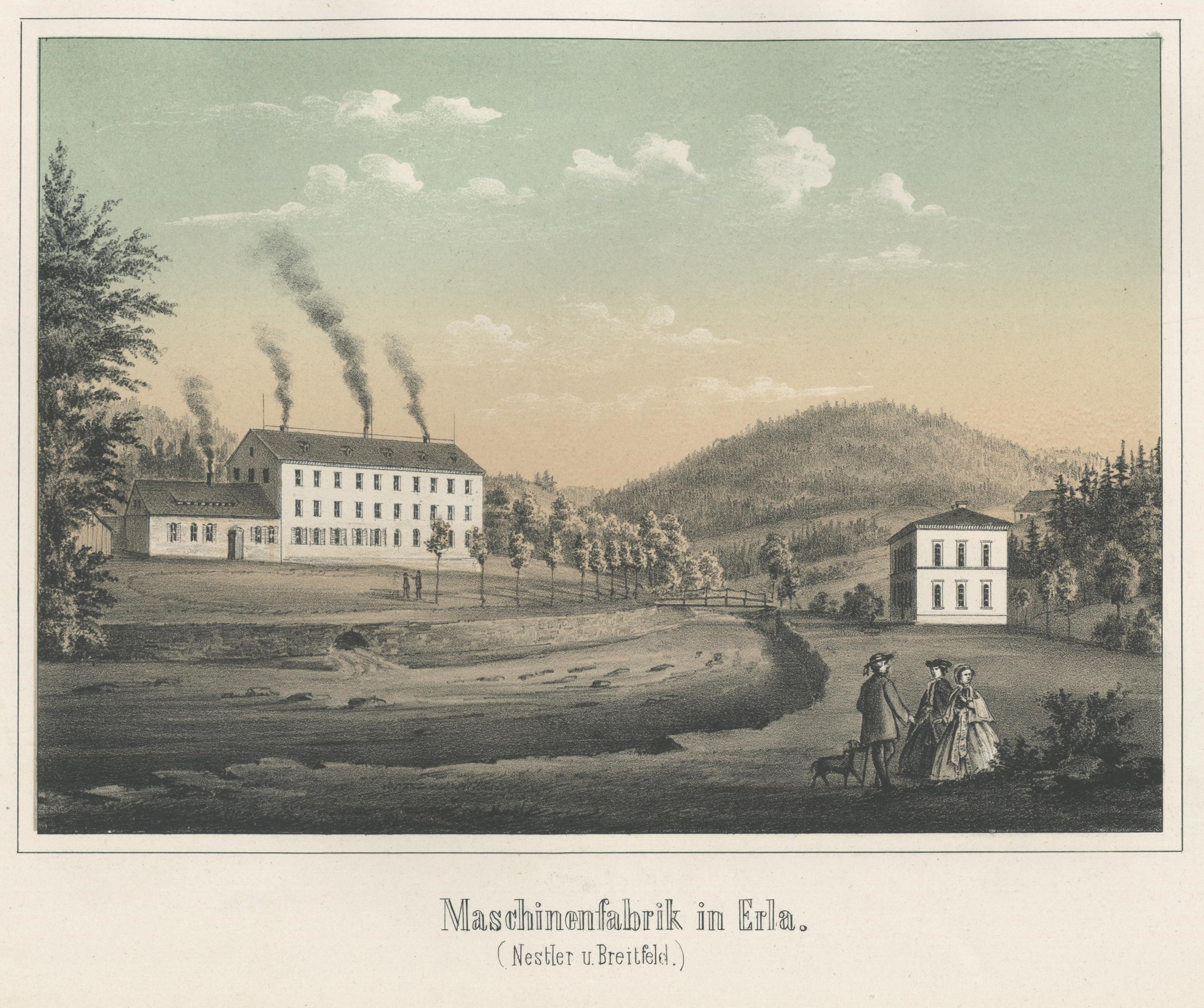 Maschinenfabrik in Erla (Nestler und Breitfeld) aus: Album der Sächsischen Industrie Zweiter Band